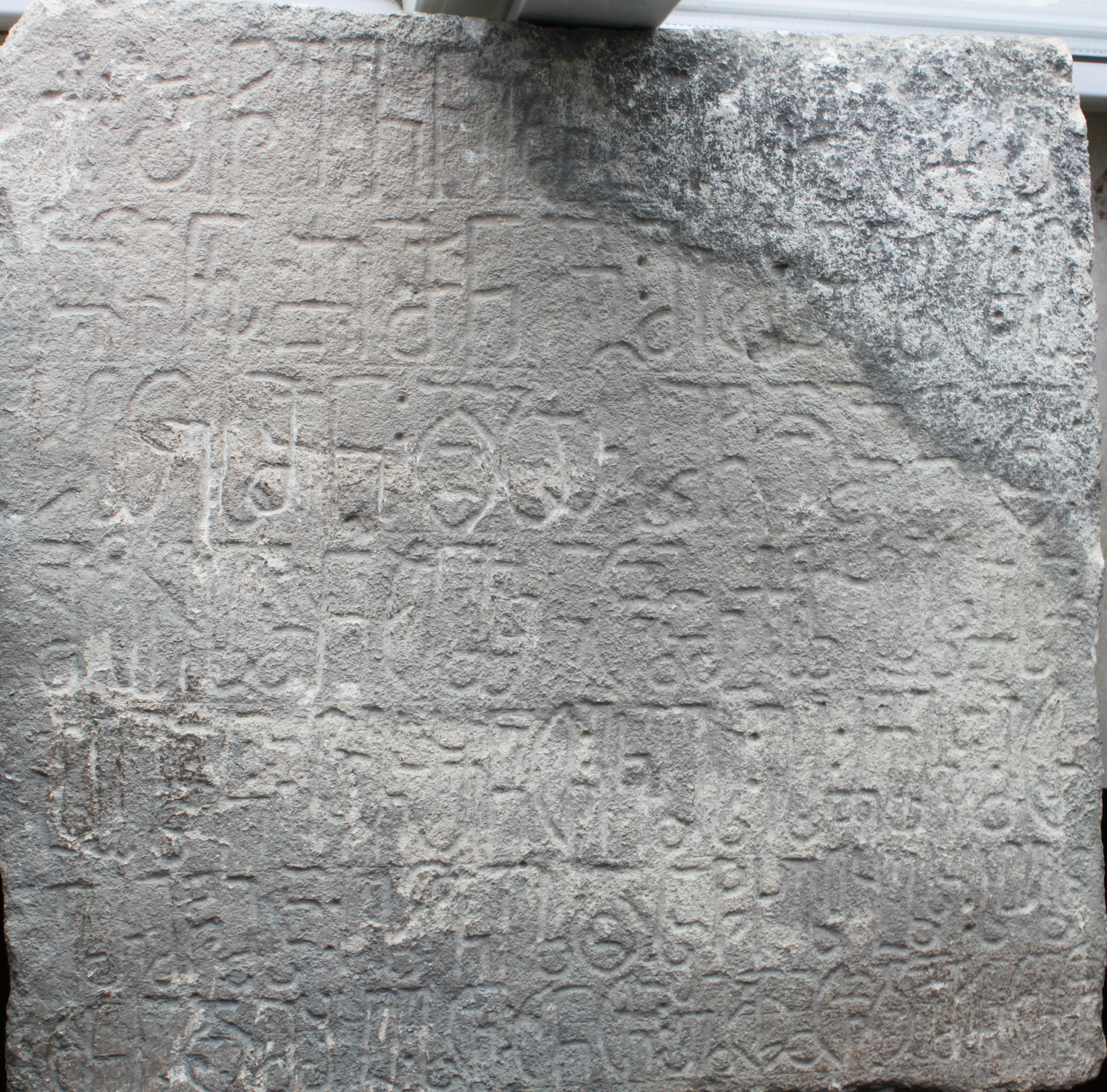 სურამის ციხის წმინდა გიორგის წარწერა